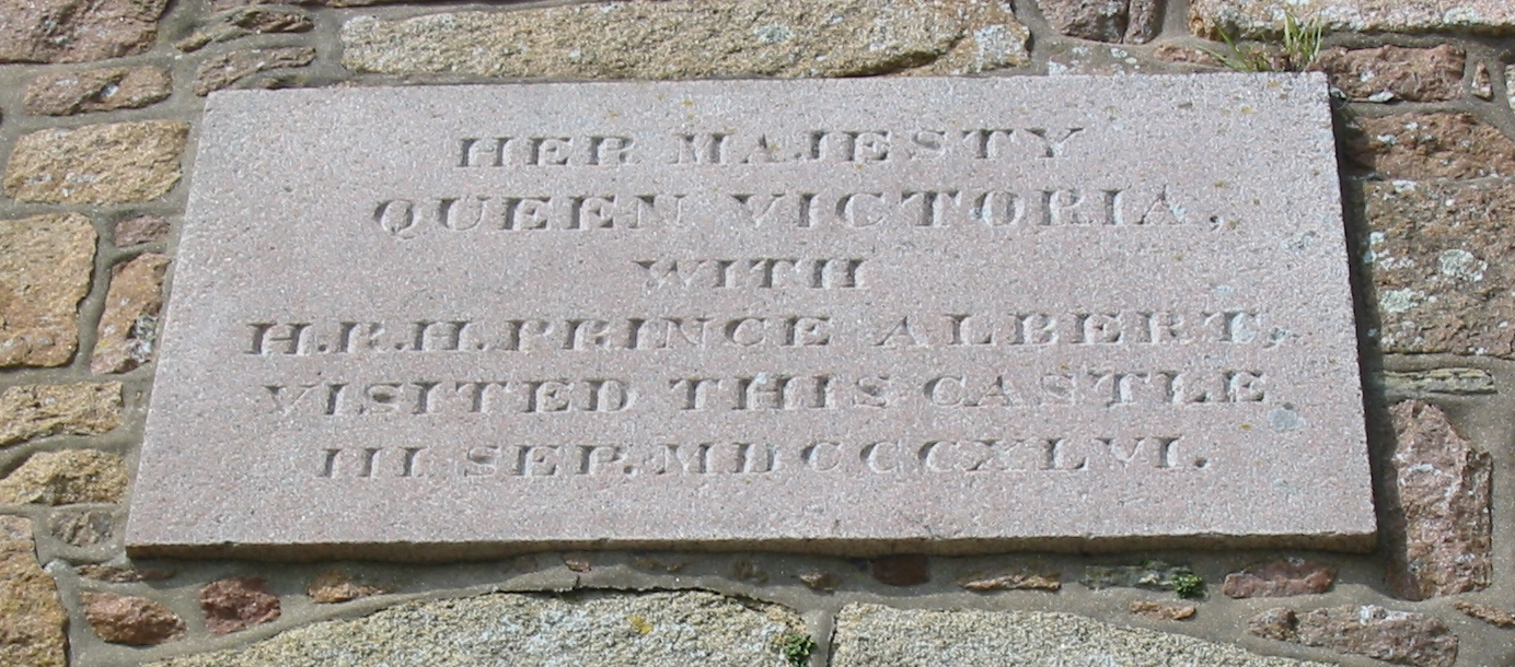 Nrf: Jèrri